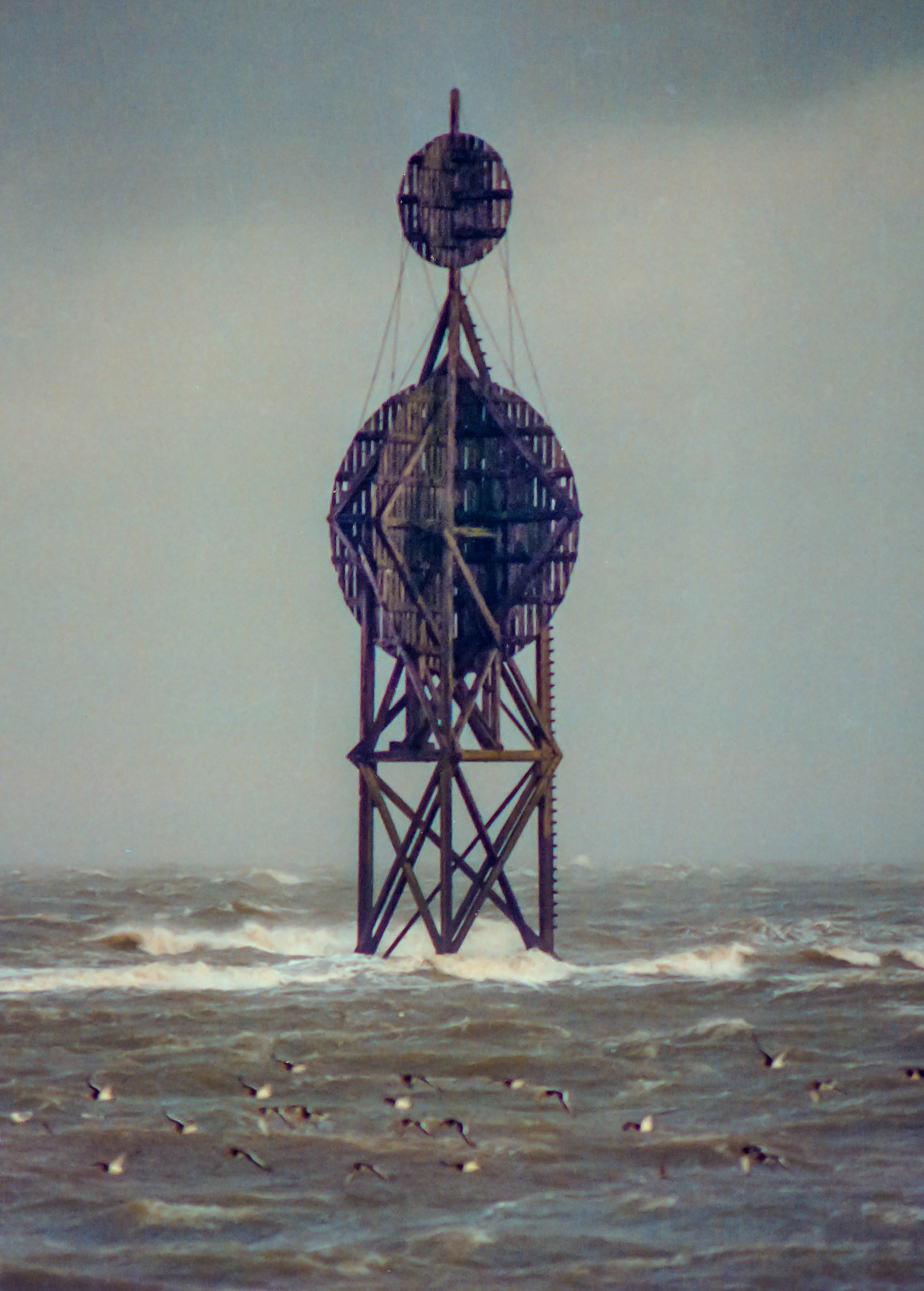 Neuwerker Ostbake im Ostvorland während der Sturmflut am 28. Januar 1994, kurz nach absolutem Höchststand. This is a photograph of an architectural monument.